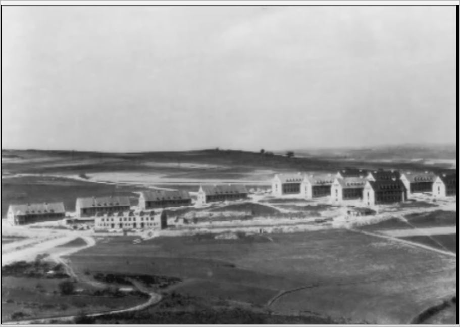 Das nicht fertiggestellte Dorf Vogelsang in der Eifel, Dreiborner Hochfläche, nah bei Wollseifen und Vogelsang